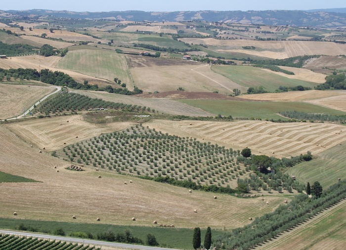 Paesaggio della Valle dell'Ombrone presso Cinigiano (GR), Tuscany (Italy)